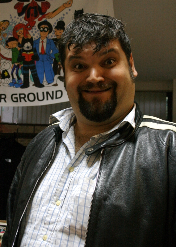 Esad Ribić na CRŠ-u 2008. u Zagrebu